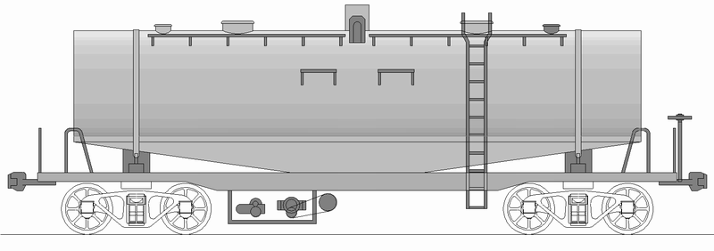 国鉄タキ3800形貨車